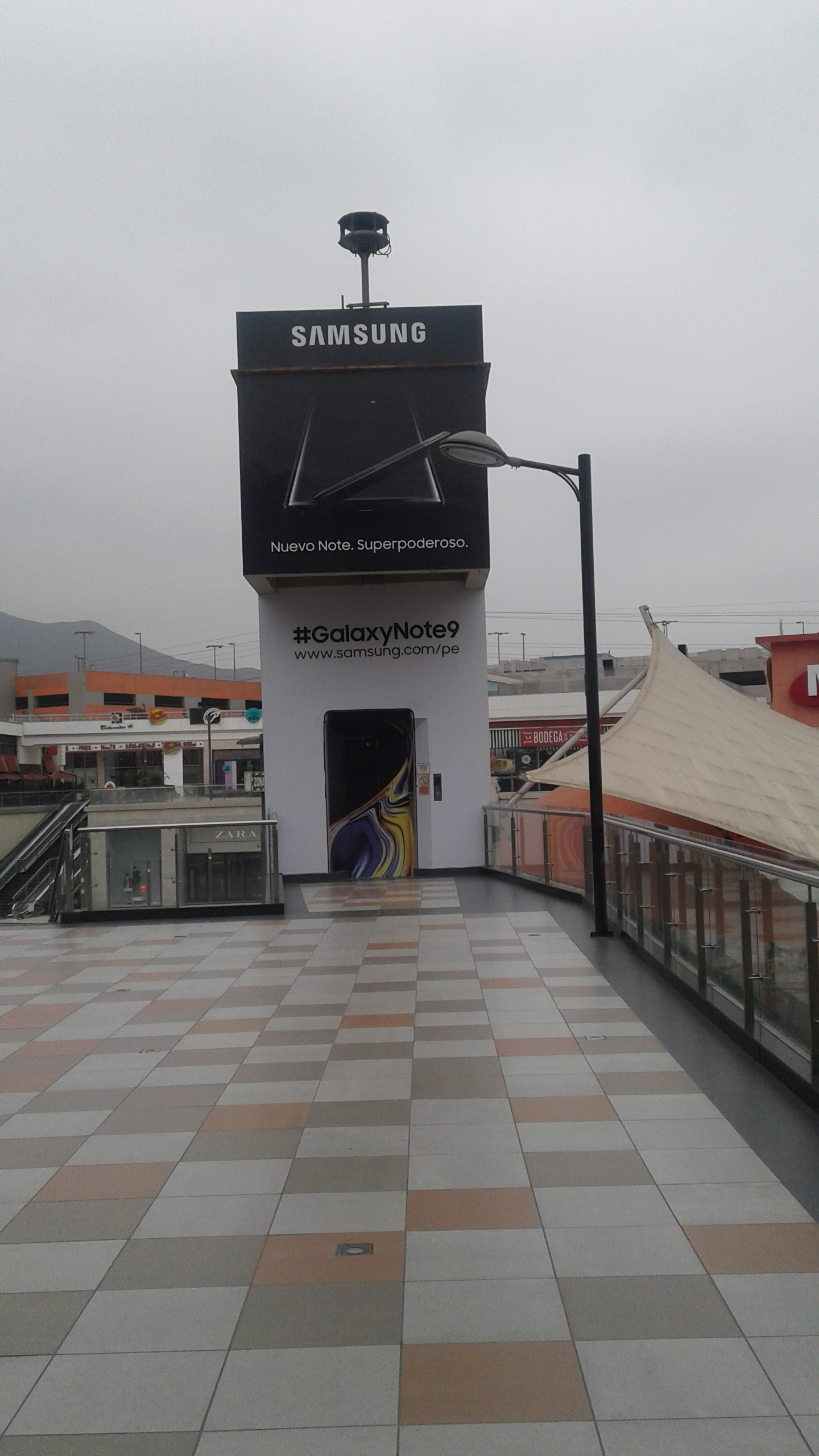 Imagen publicitaria del Nuevo Samsung Galaxy Note 9.